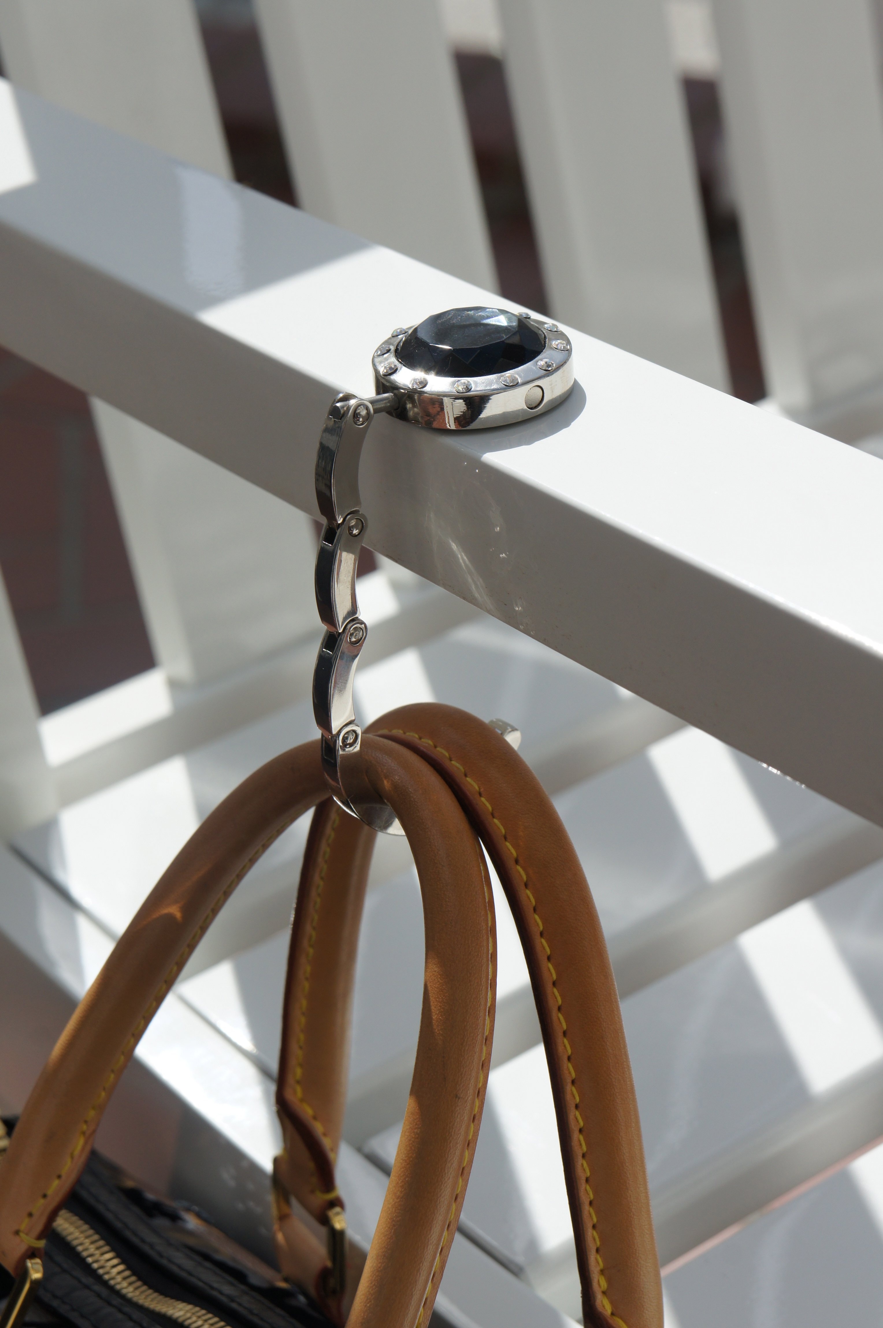 Handtaschenhalter von taeshy an der Stuhllehne